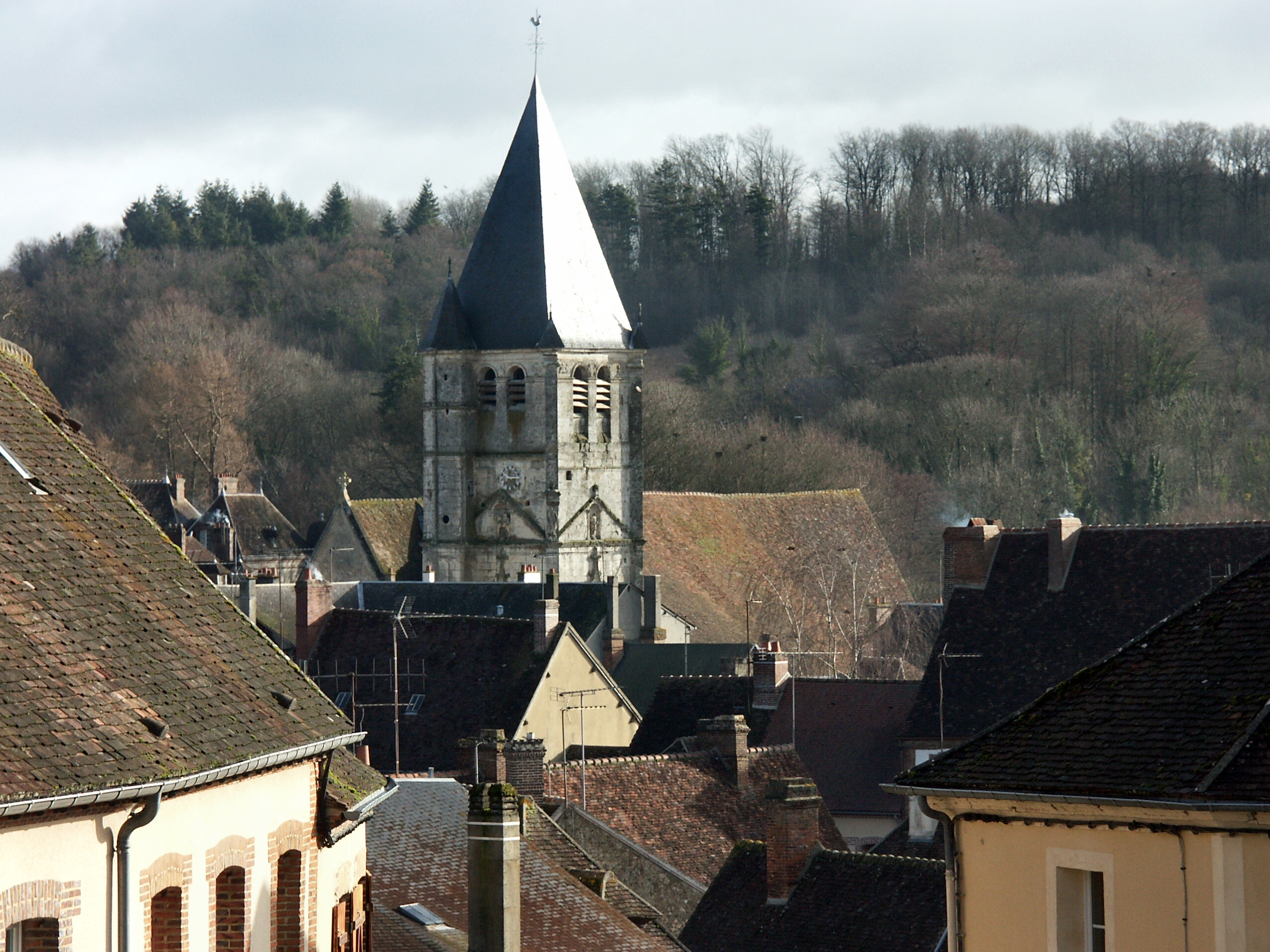 16e. Tour vue de l’ouest. CMH 1909